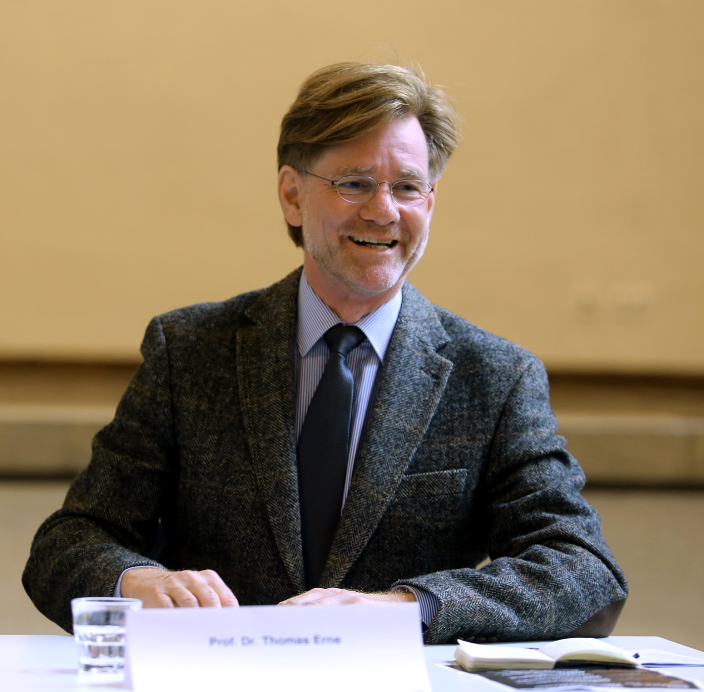 Prof. Dr. Thomas Erne, Professor für Praktische Theologie und Autor mehrerer religiöser Kinder- und Jugendbücher. Hier während seiner kurzen Ansprache auf der Pressekonferenz zum 28. Evangelischen Kirchenbautag am 2.10.2014 in München